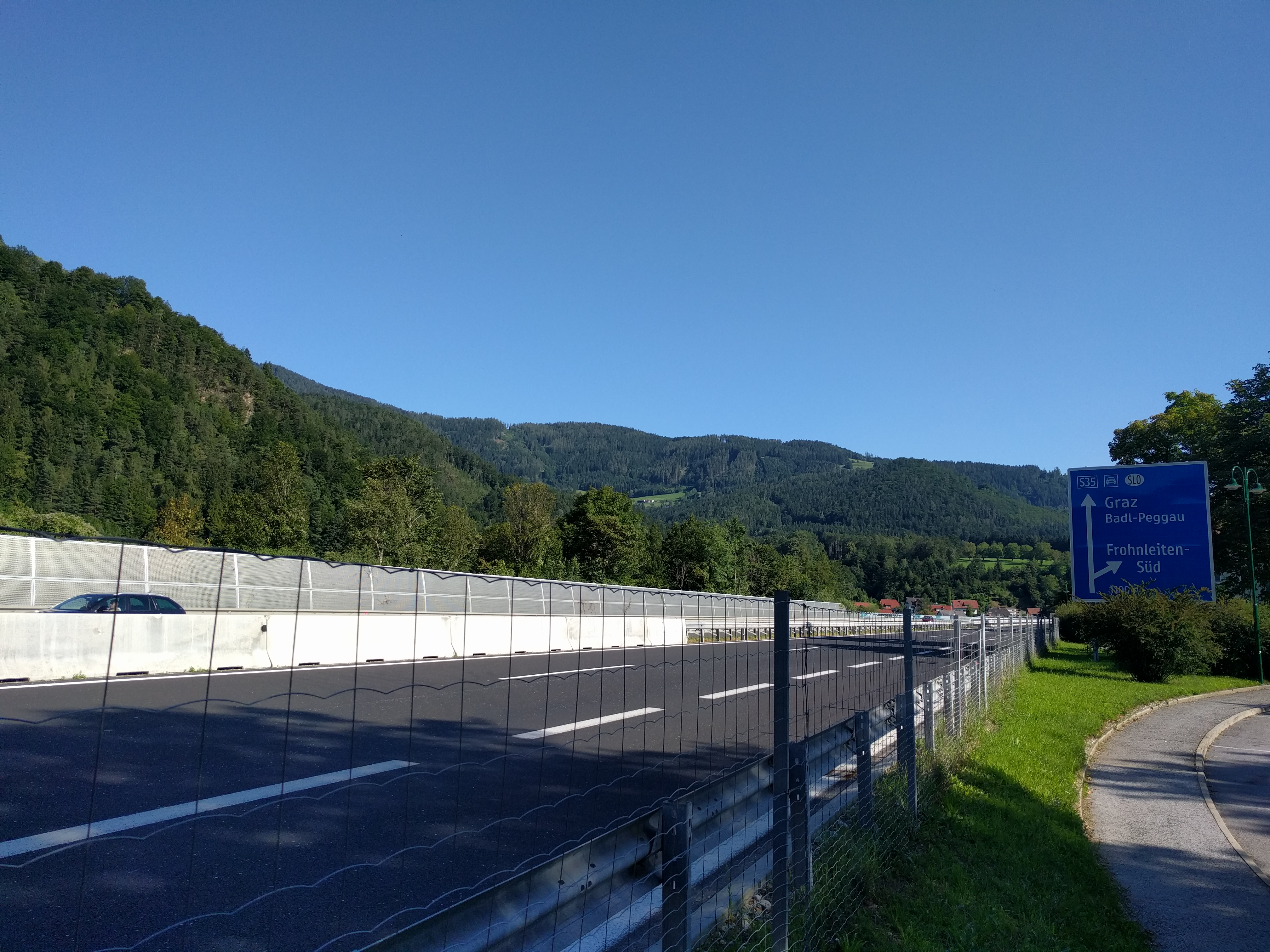 S35 bei Frohnleiten Bildmitte: S35 rechts: Wegweiser und dahinter Rathaus